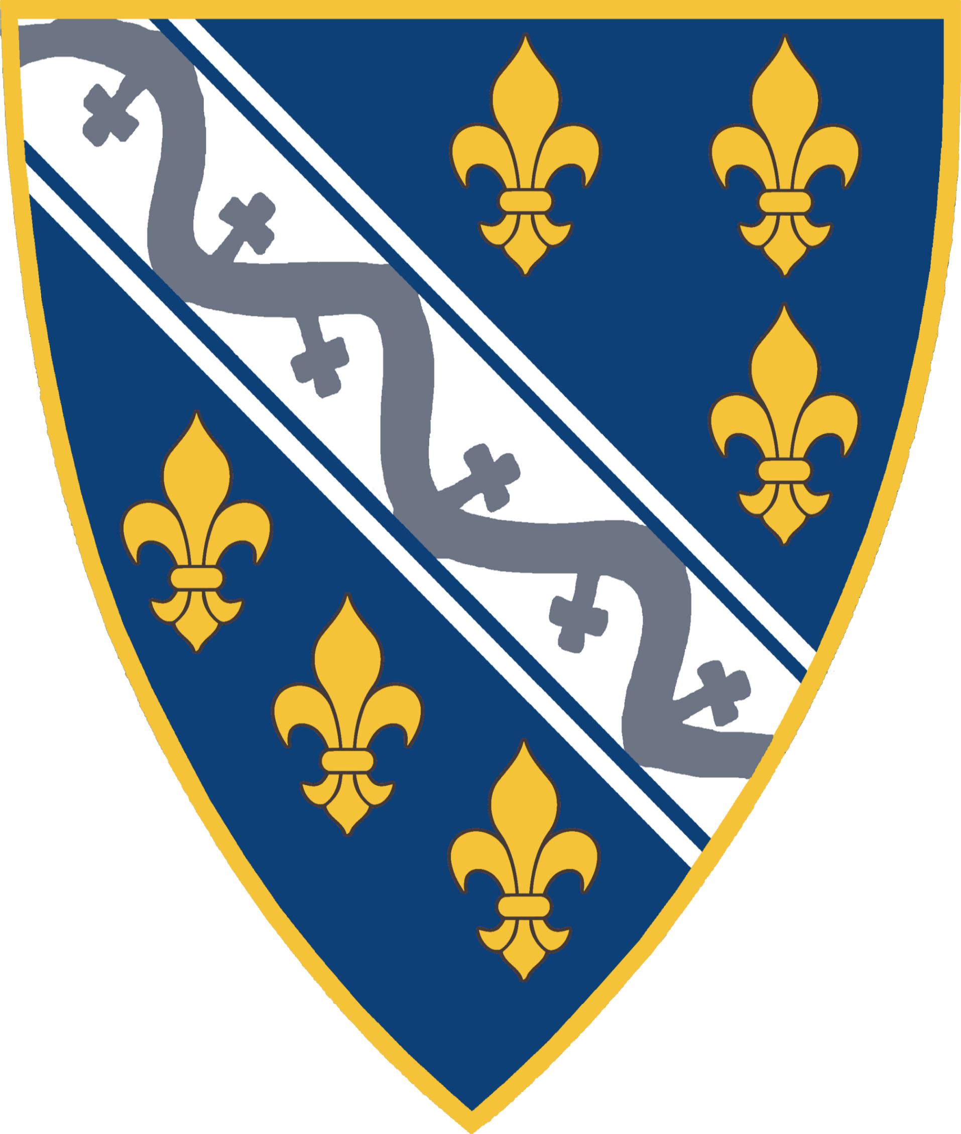 Грб Котроманића од 1377. године, штит.